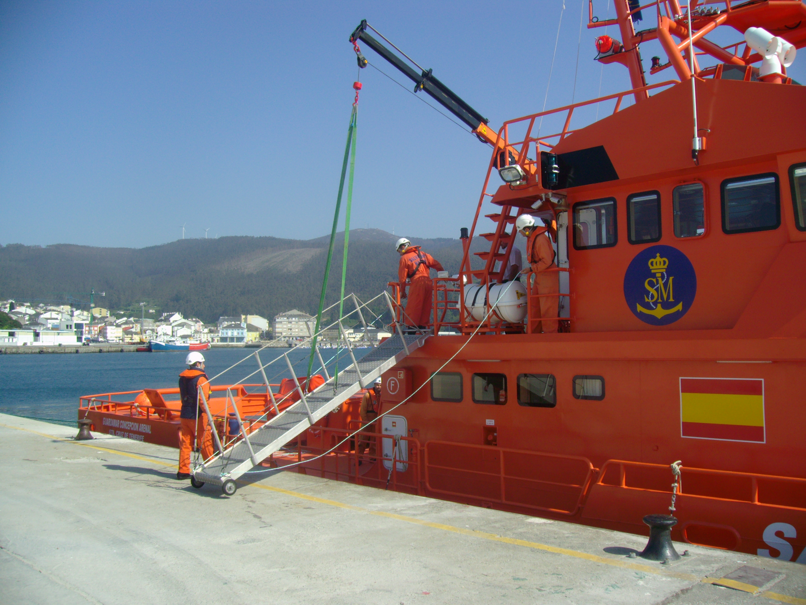 La Guardamar Concepción Arenal (G-10) de la Sociedad de Salvamento y Seguridad Marítima (Salvamento Marítimo) en el proceso de atraque en el Puerto de Celeiro (Viveiro) Docking process of Guardamar Concepción Arenal (G-10) of Salvamento Marítimo at Celeiro Port, in Viveiro, Spain. MMSI number: 224 568 000 IMO number: 9541655 Yard of built: ARMON Year of build: 2009 Launch method afloat Length 31,90 m Beam 7,50 m